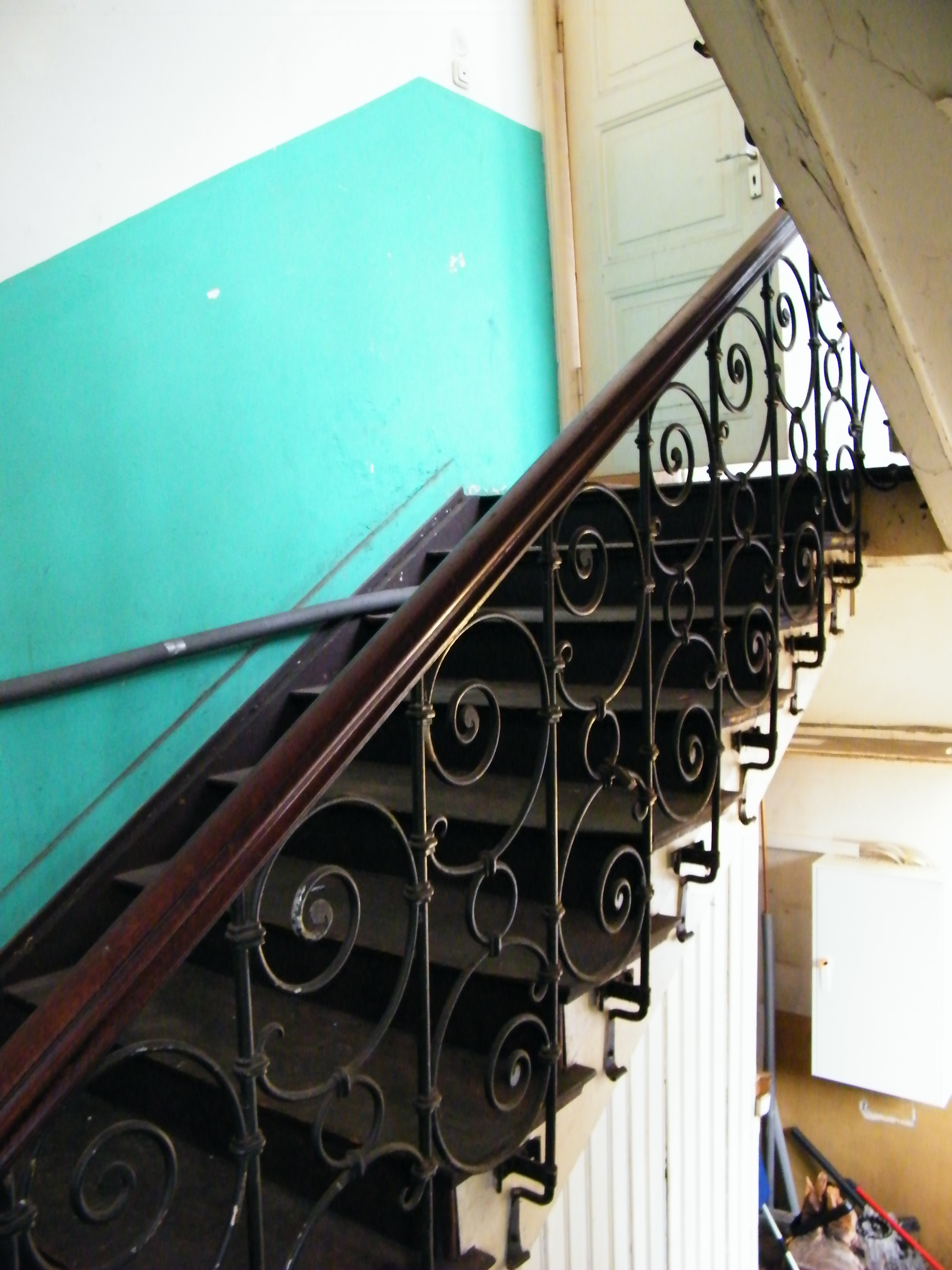 Künstlerhaus Kempten - Hinteres Treppenhaus